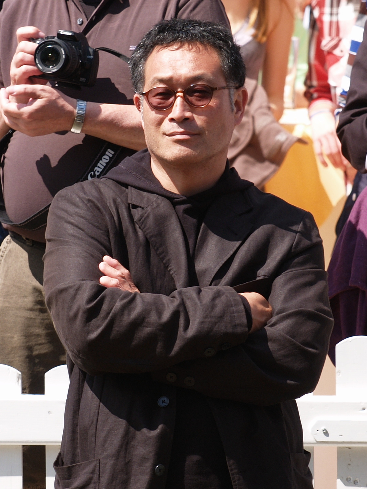 Tadashi Kawamata, ein japanischer Objektkünstler, bei der Eröffnungsveranstaltung der Emscherkunst.2010 in Herne